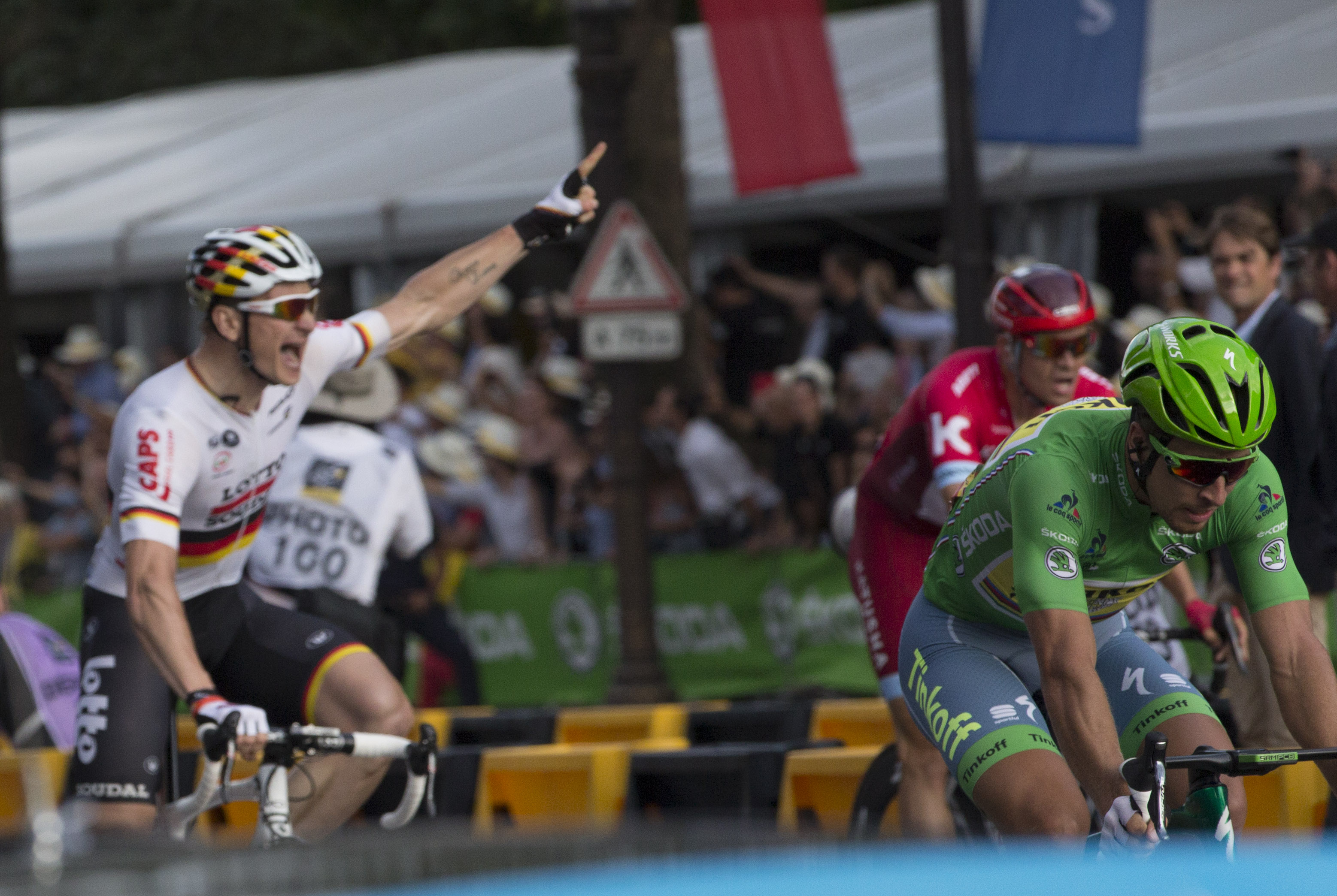 Stage 21 - into Paris